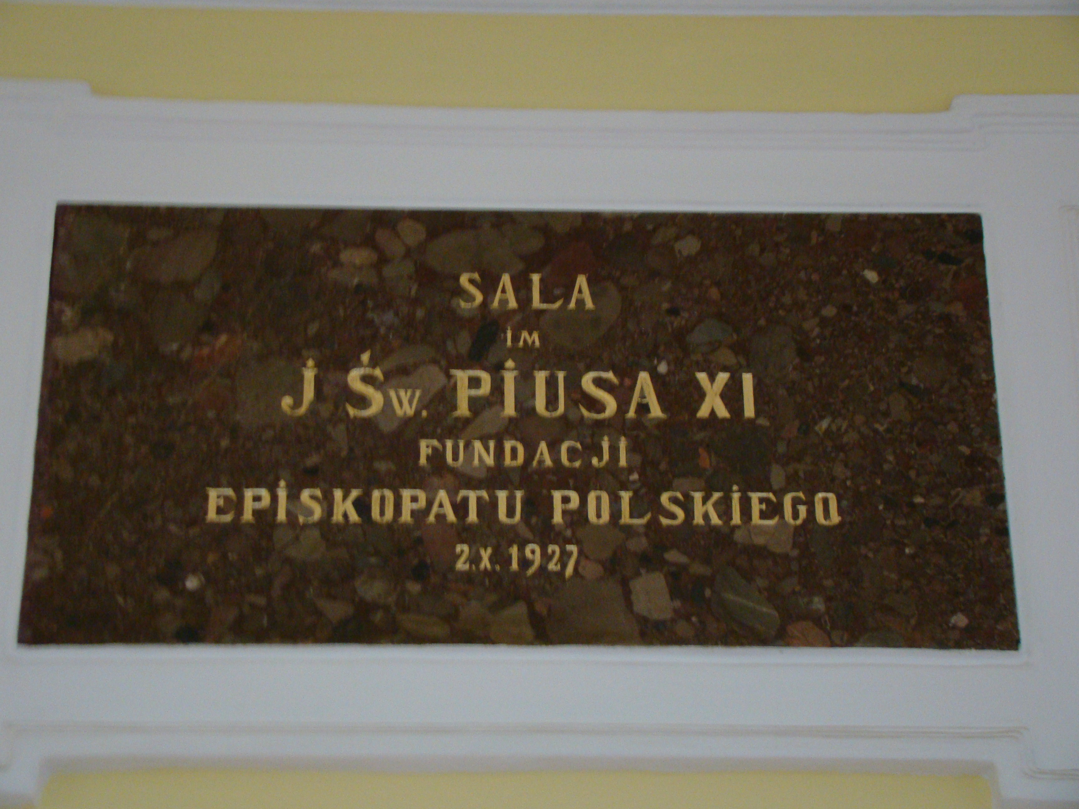 Tablica z informacją o sali im. Piusa XI na KULu